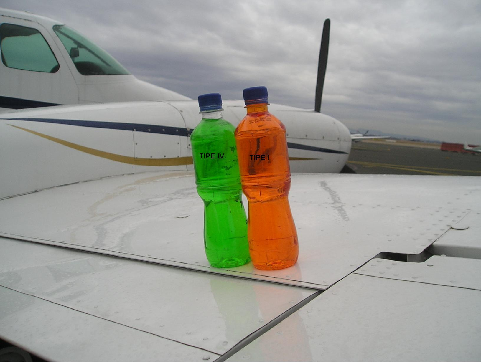 ADF zrakoplova